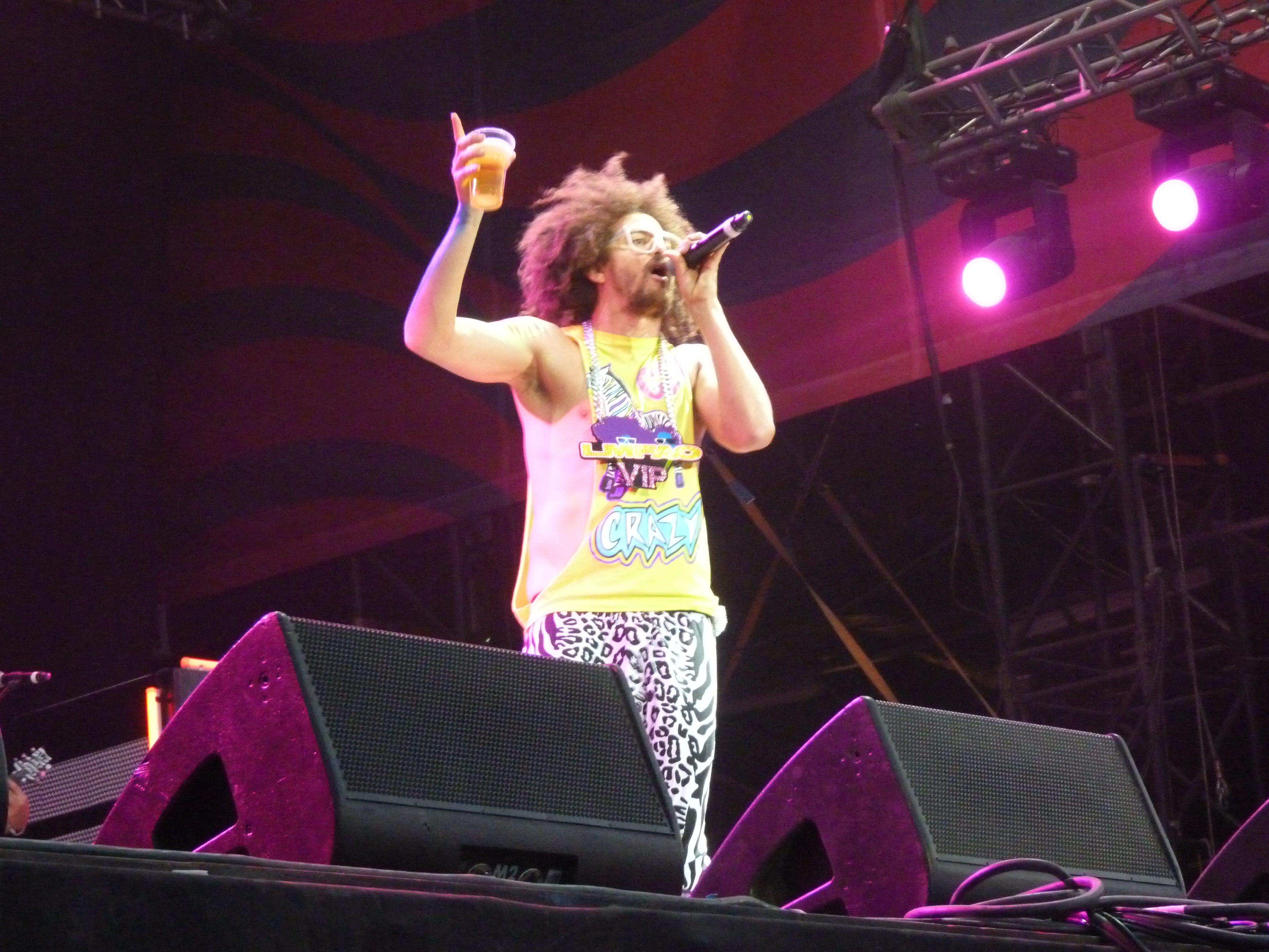 Live on the 12th of August, 2012. Budapest, the Sziget Festival. LMFAO. Published under Creative Commons in the Metapolisz DVD line. A felvételek 2012. Augusztus 12 –én vasárnap készültek Budapesten, a Sziget Fesztiválon. LMFAO. Megjelent Creative Commons alatt a Metapolisz DVD sorozatban.